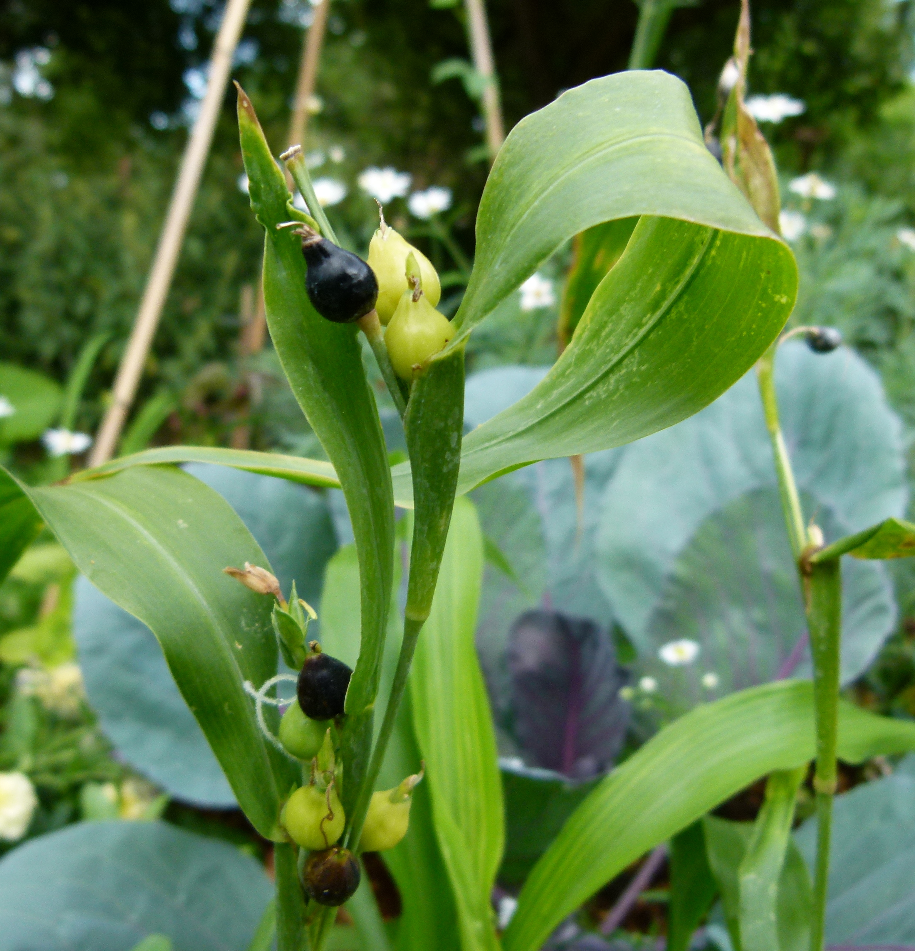 Larme de Job